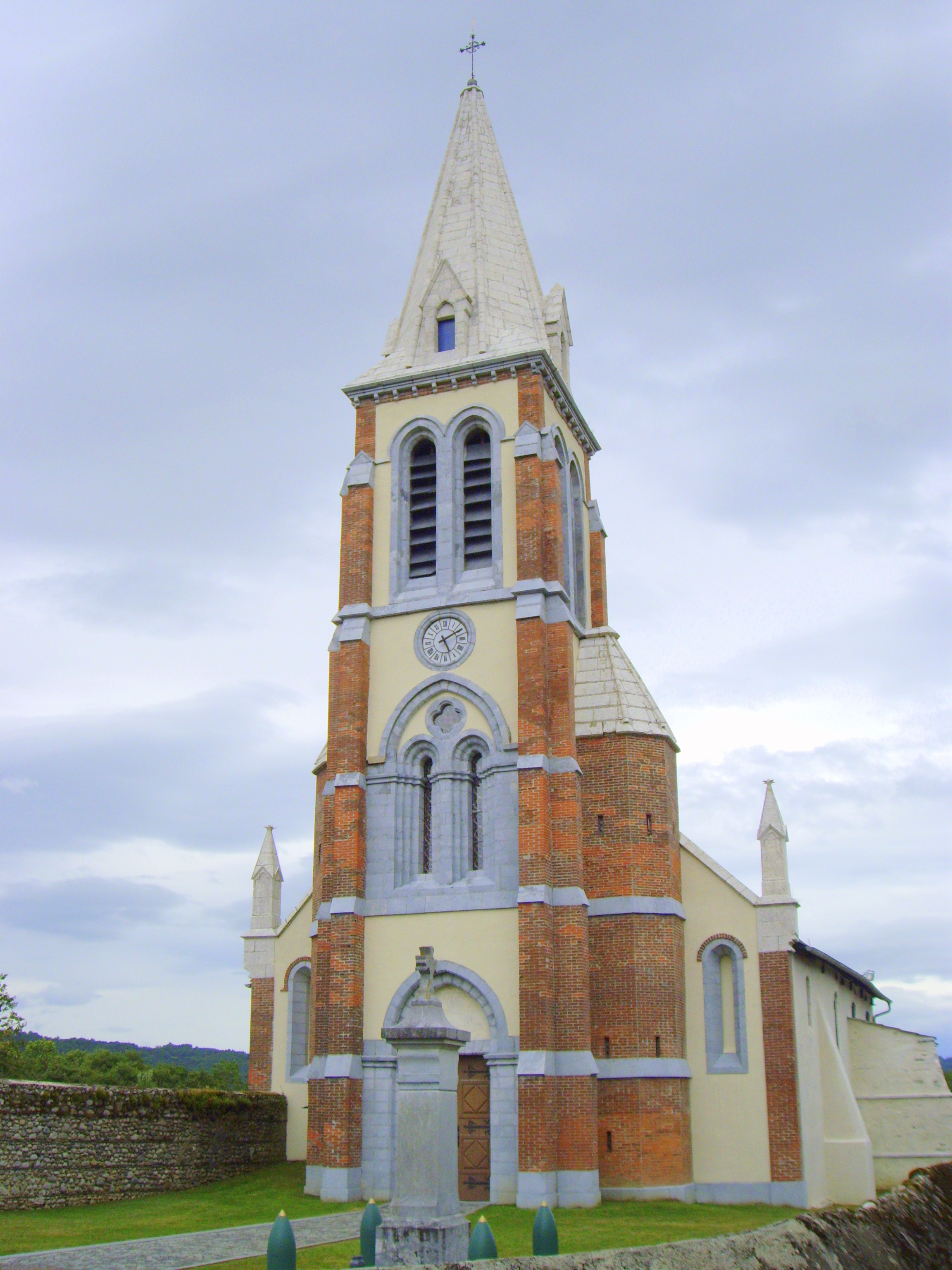 Église Saint-Blaise de Lanne (65)